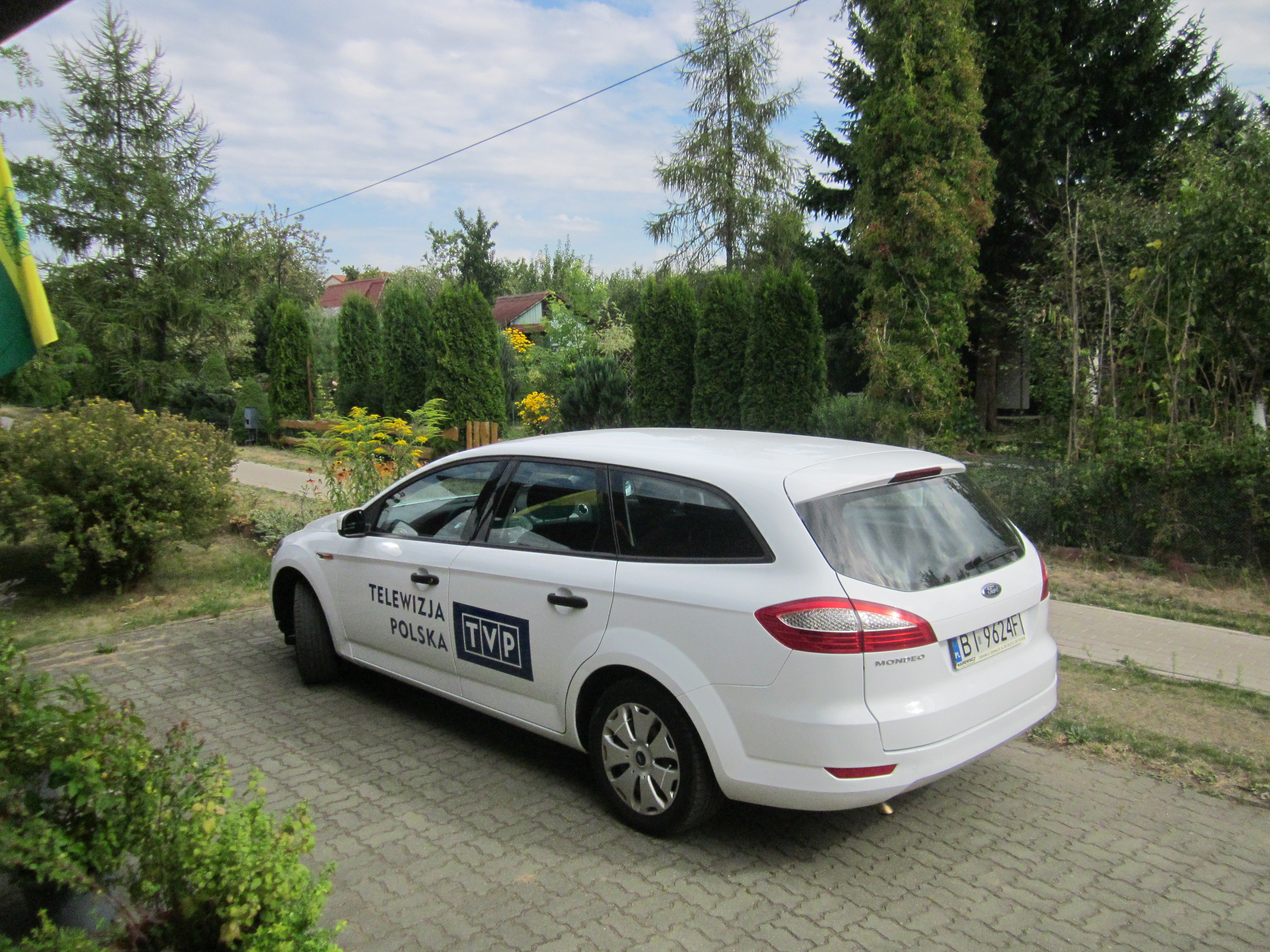 TVP Białystok. Dni Działkowca, zorganizowane przez Okręgowy Zarząd Podlaski PZD Białystok w 2015 na terenie ROD Relaks